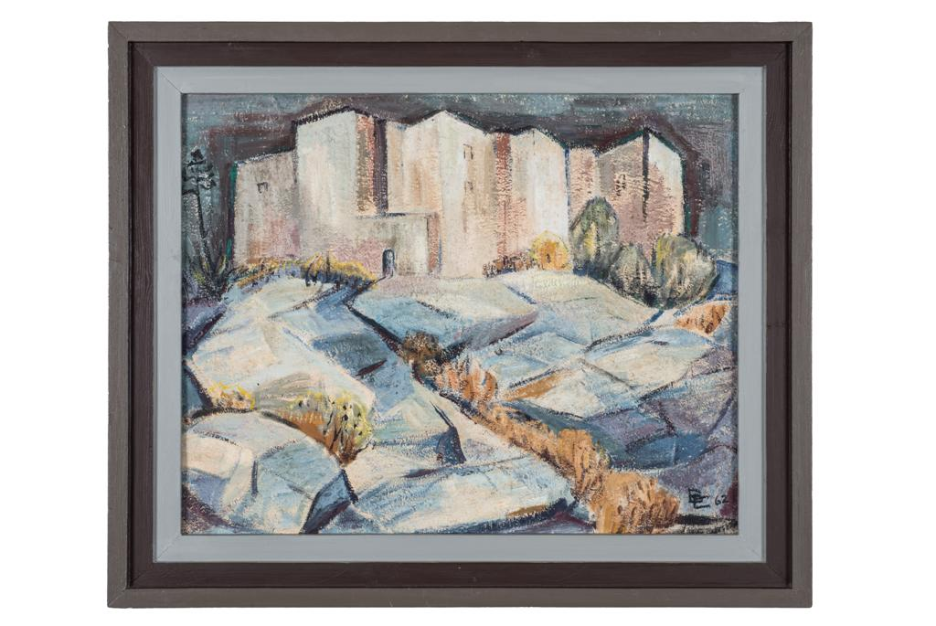 Bettina Encke von Arnim; ohne Titel, 1962, Öl auf Leinwand